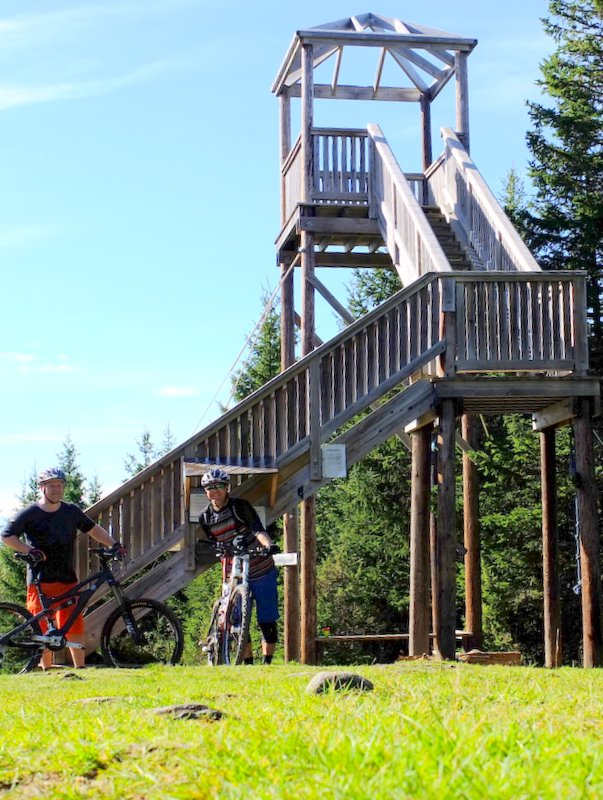 Tårnet på Solemsvåttan.